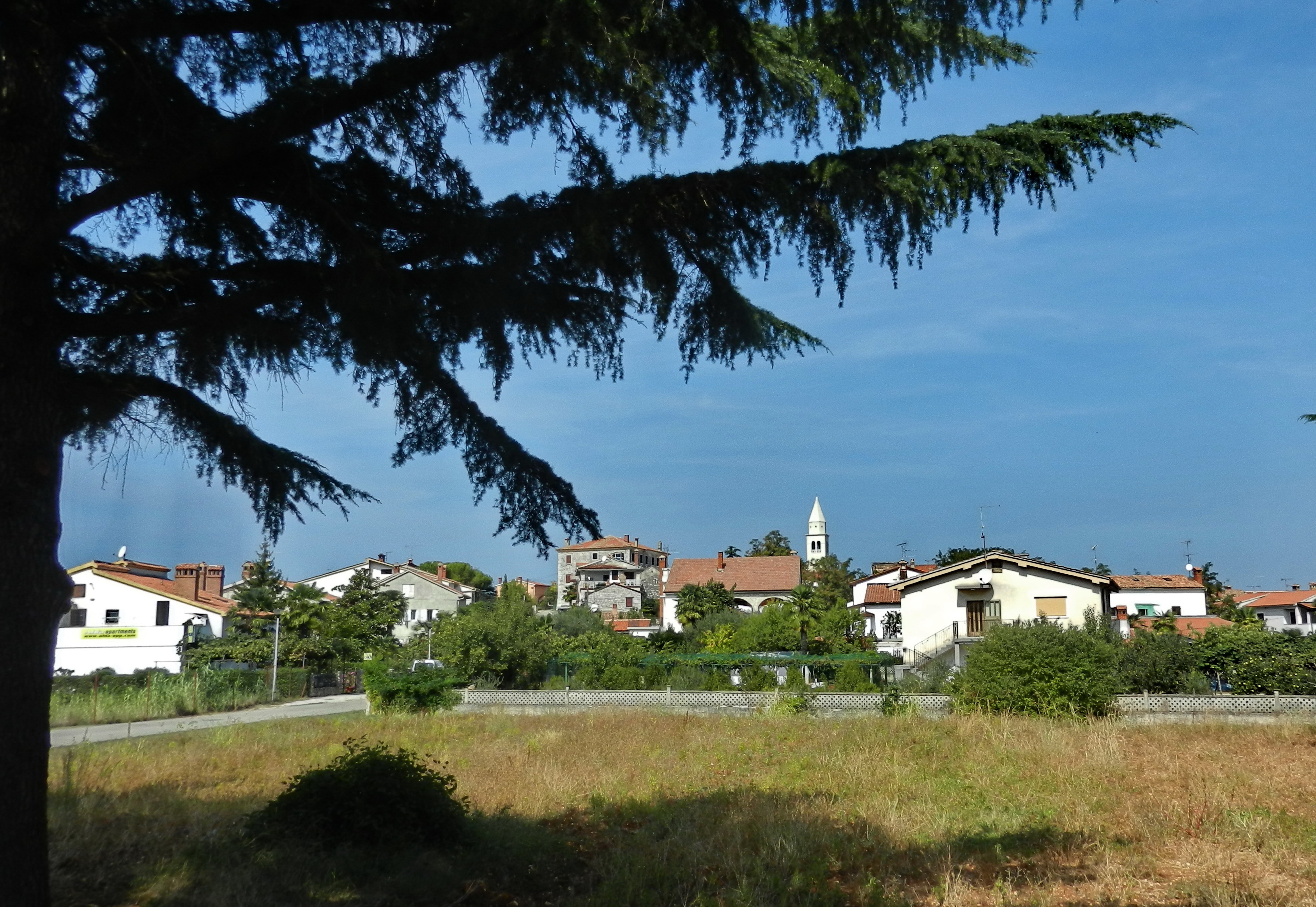 Funtana